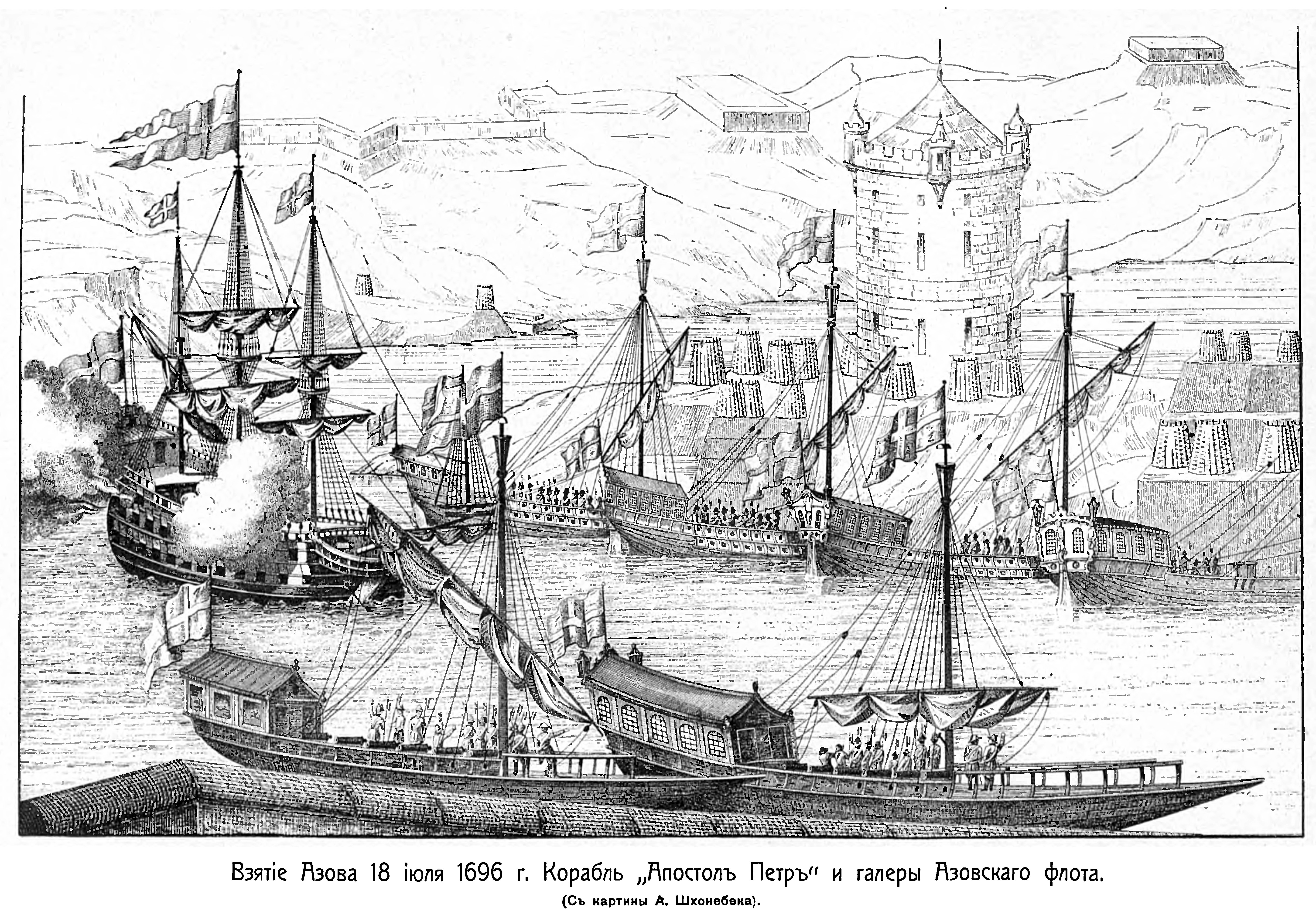 Взятие Азова. На рисунке корабль «Апостол Пётр» и галеры Азовского флота. 1696 год. Данное изображение было размещено в «Военной энциклопедии» изданной книгоиздательским товариществом Ивана Дмитриевича Сытина (Санкт-Петербург; 1911—1915 гг.) в статье «Азовский флот».